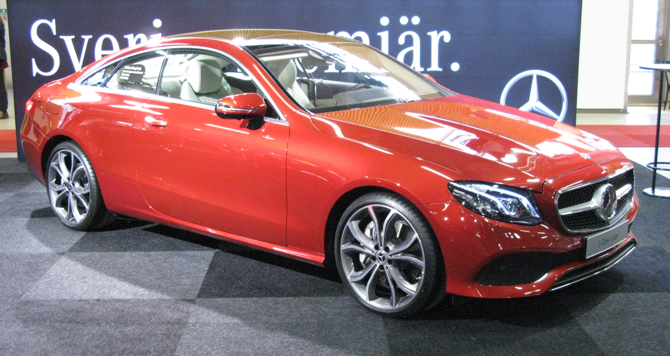 2017 Mercedes-Benz E Coupé